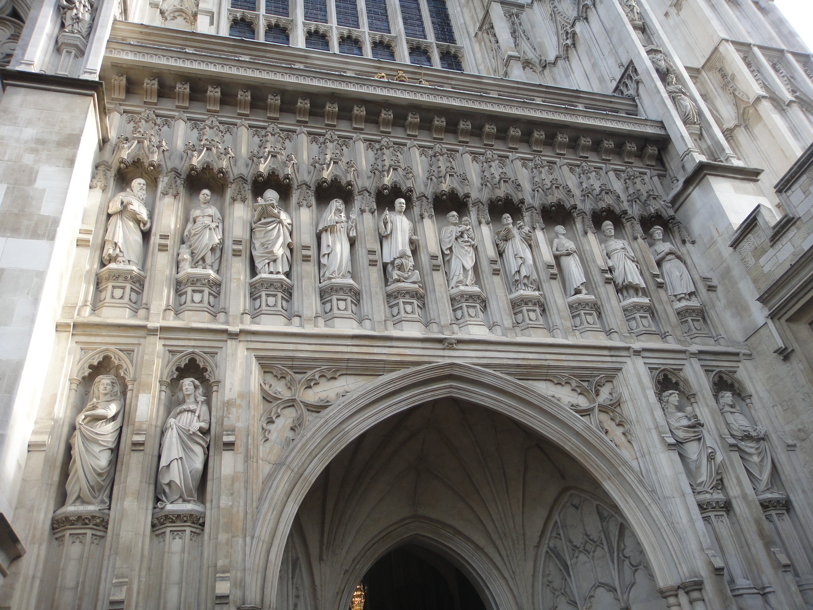 西敏寺西大門的十尊基督教殉道者塑像